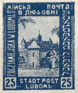 Luboml 1918 rok